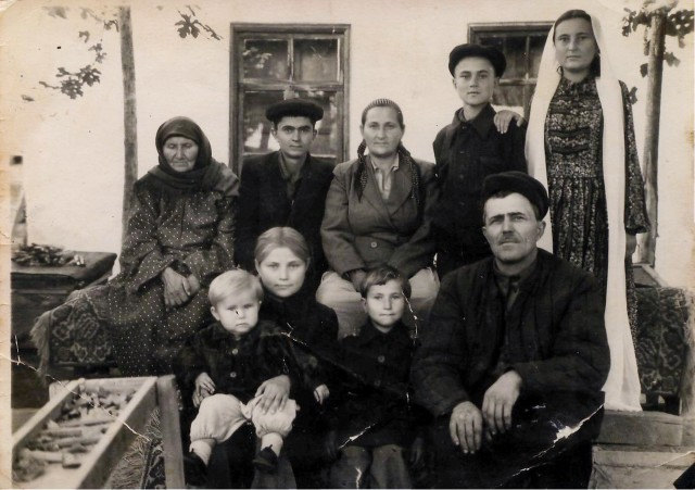 Семья Сайдаева